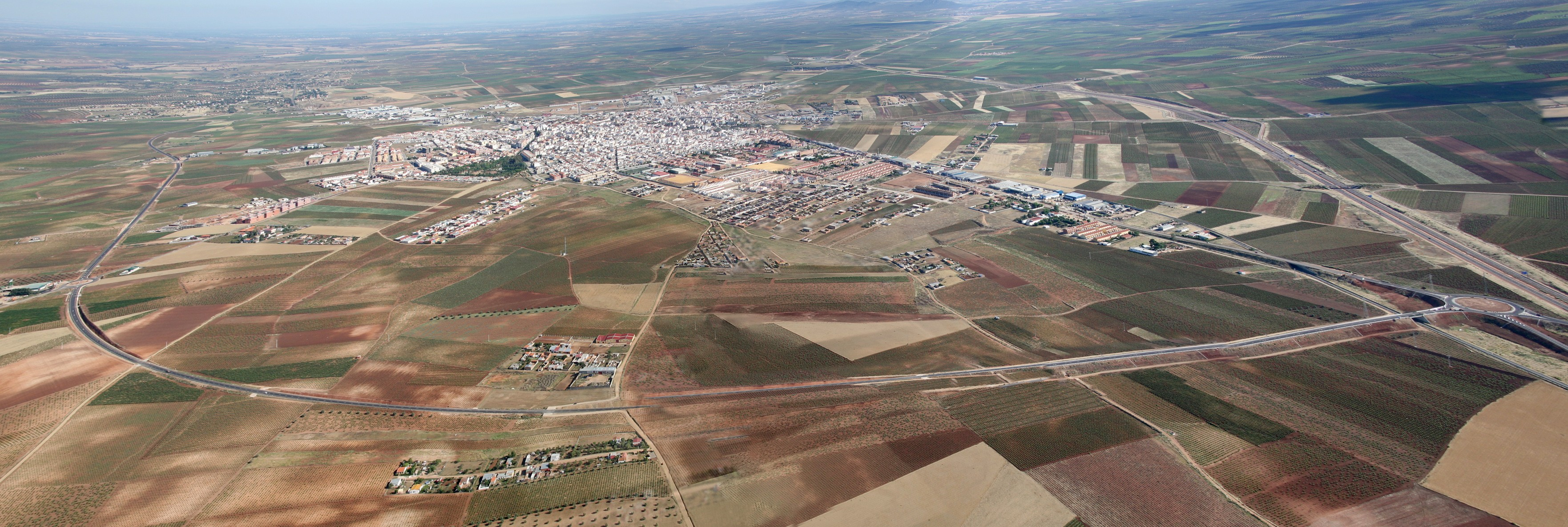 Vista aérea de la nueva Circunvalación Oeste de Almendralejo (EX-359). Tramo sur.